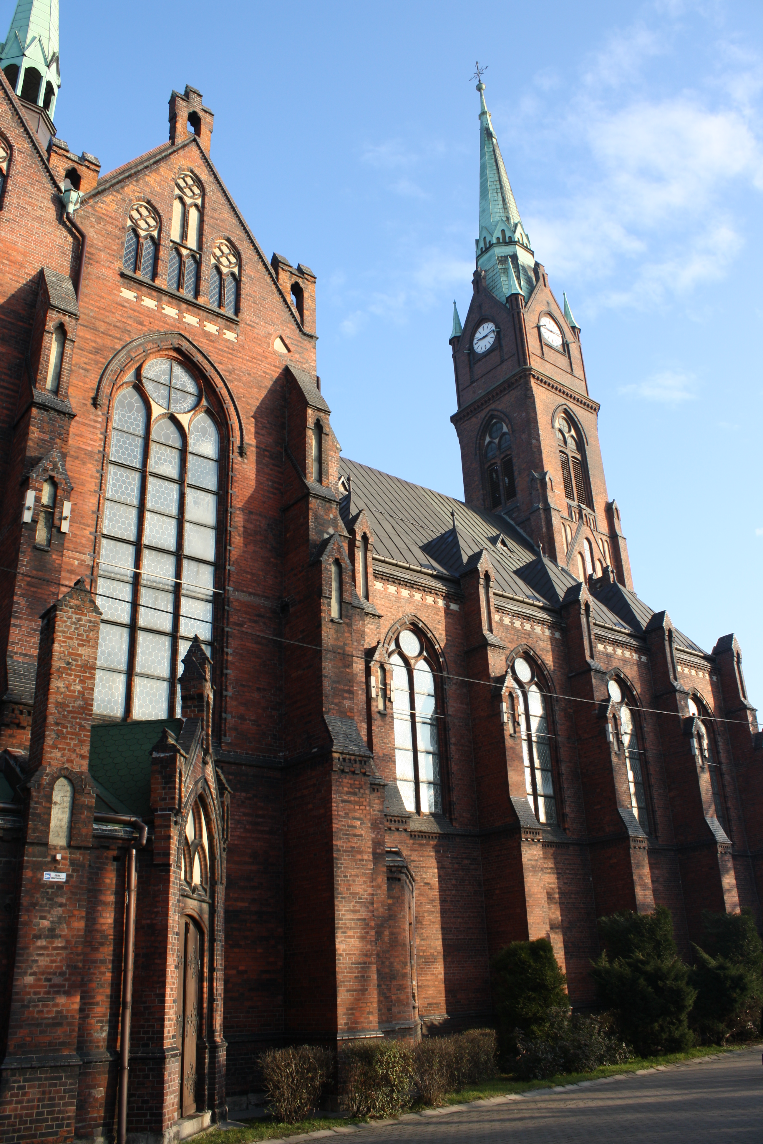 Chorzów - Batory (d. Wielkie Hajduki), kościół NMP, widok na wieżę i fasadę transeptu